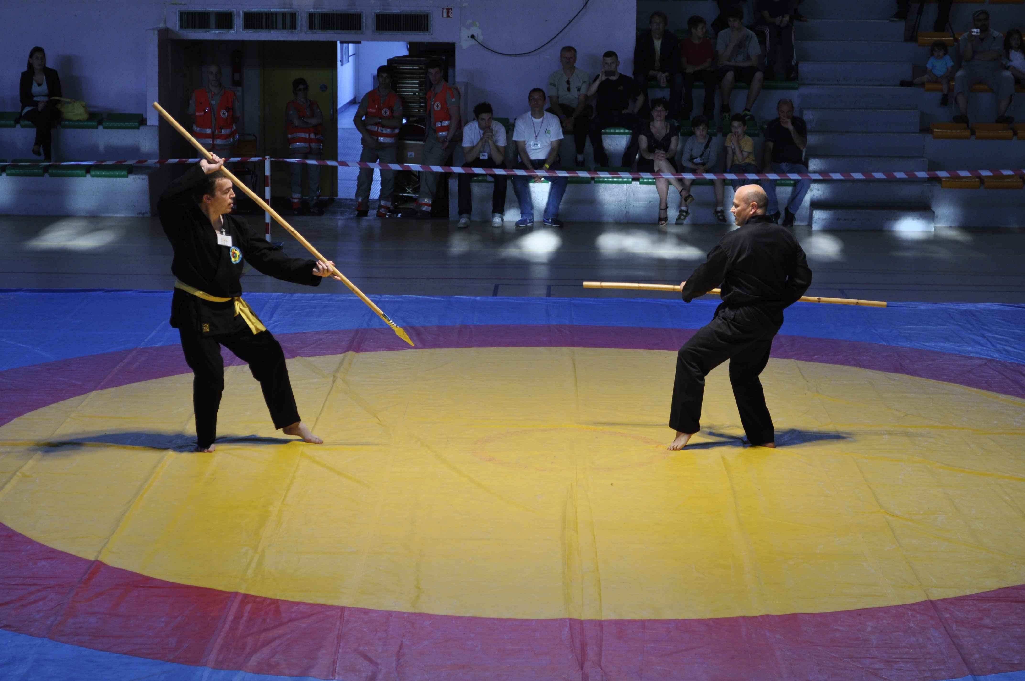 Nuit des arts martiaux à Aulnay-sous-Bois samedi 30 juin 2012. Démonstration de Viet Vo Dao.